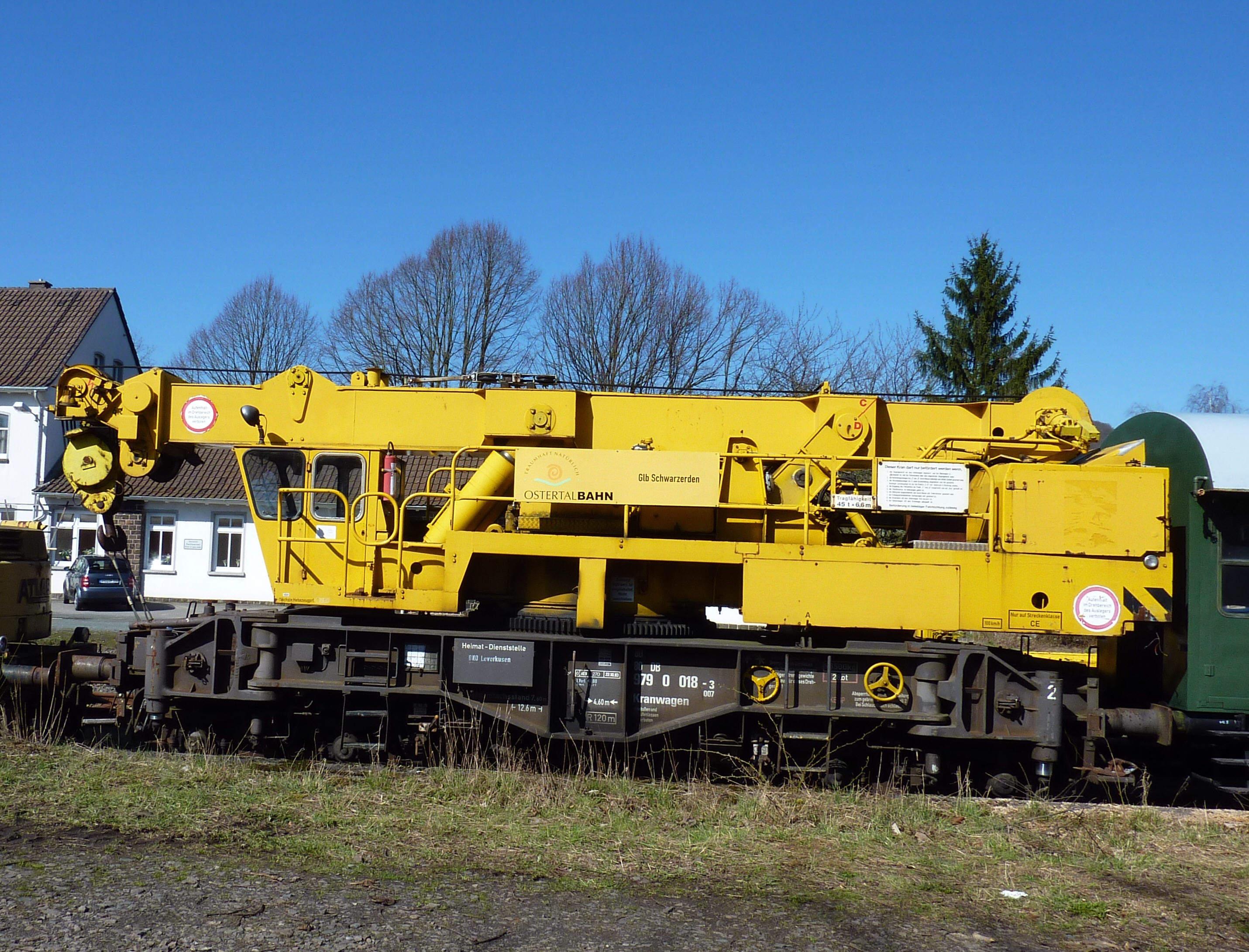 am Bahnhof Schwarzerden